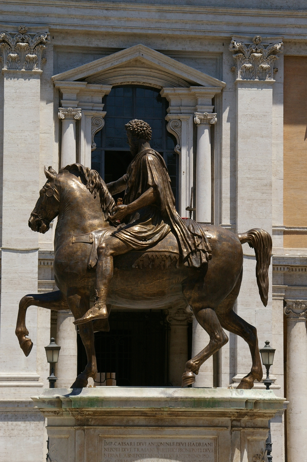 Rom, Capitol, Reiterstatue Marc Aurels im Juli 2005.